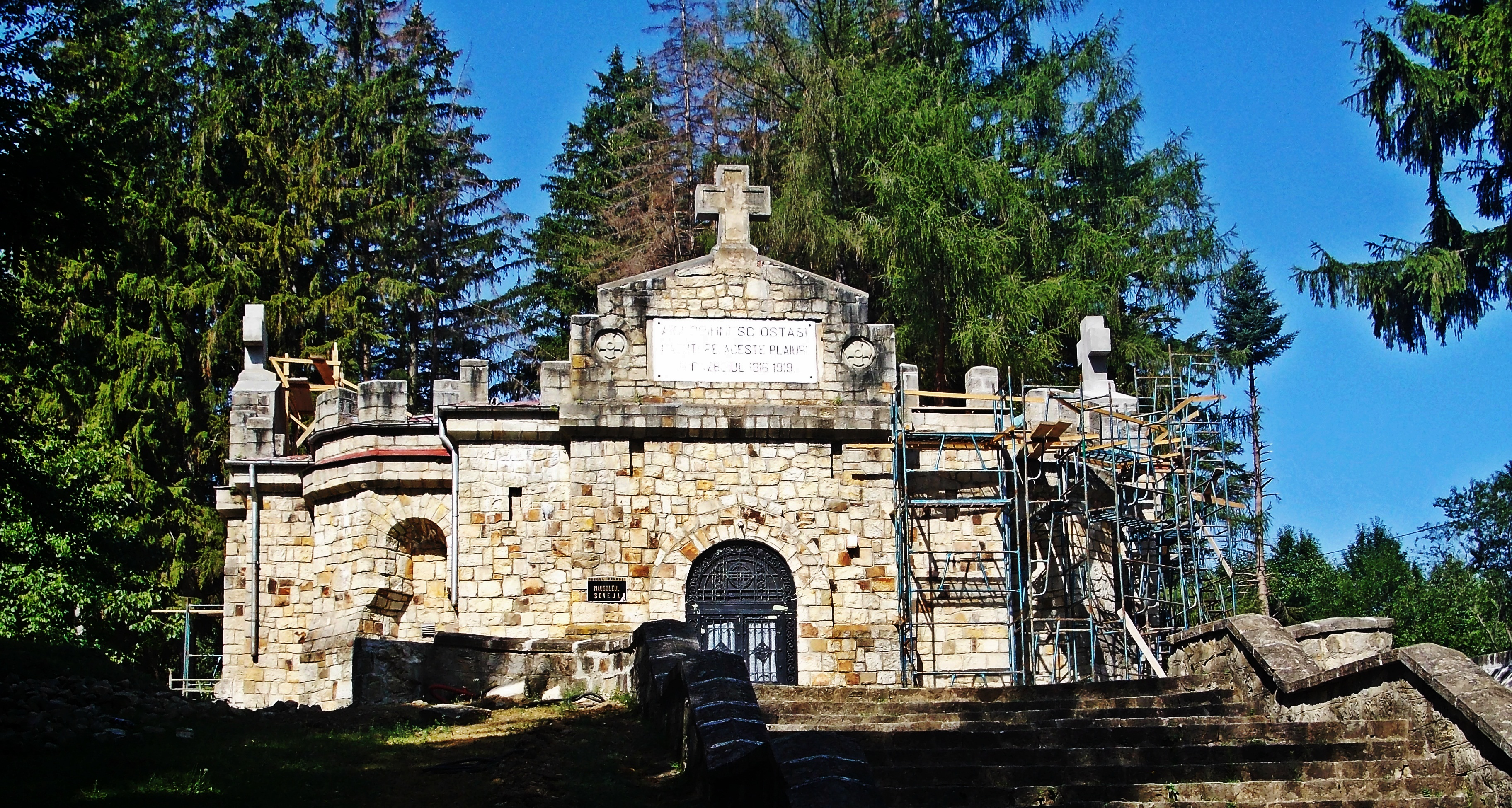 sat Dragosloveni, comuna Soveja, judet Vrancea